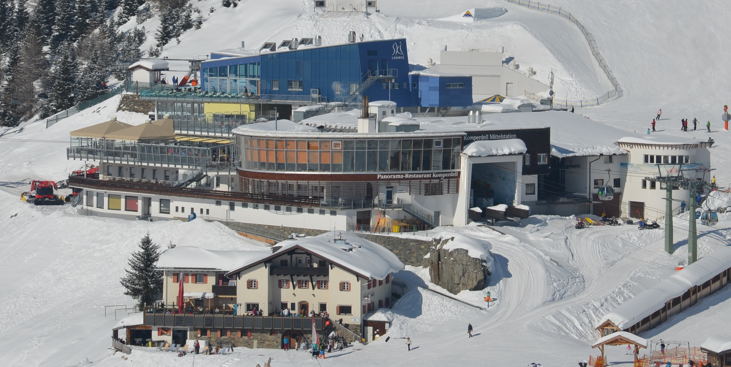 Das Kölner Haus und Komperdell vom Alpkopf aus gesehen